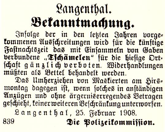 Bekanntmachung: Verbot des «Tschämelen» während der Fasnachtszeit in Langenthal